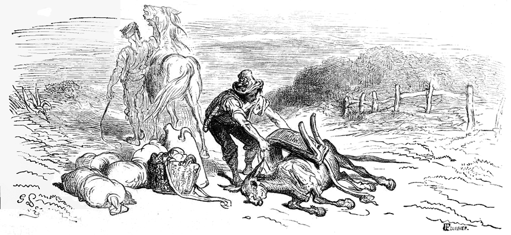 grafika z książki PL Bajki, Jean de La Fontaine, nakładem i drukiem Jana Noskowskiego, Warszawa 1876